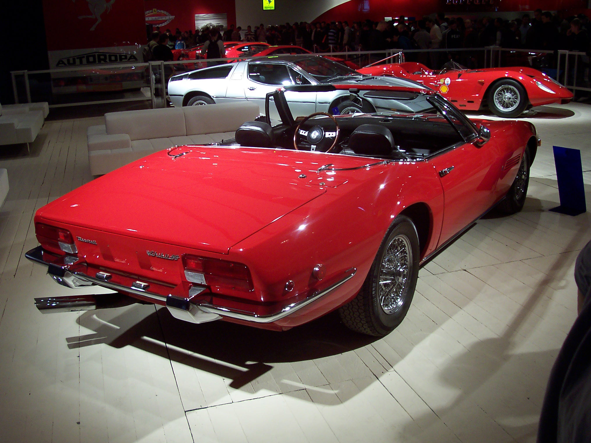 Maserati Ghibli Spider